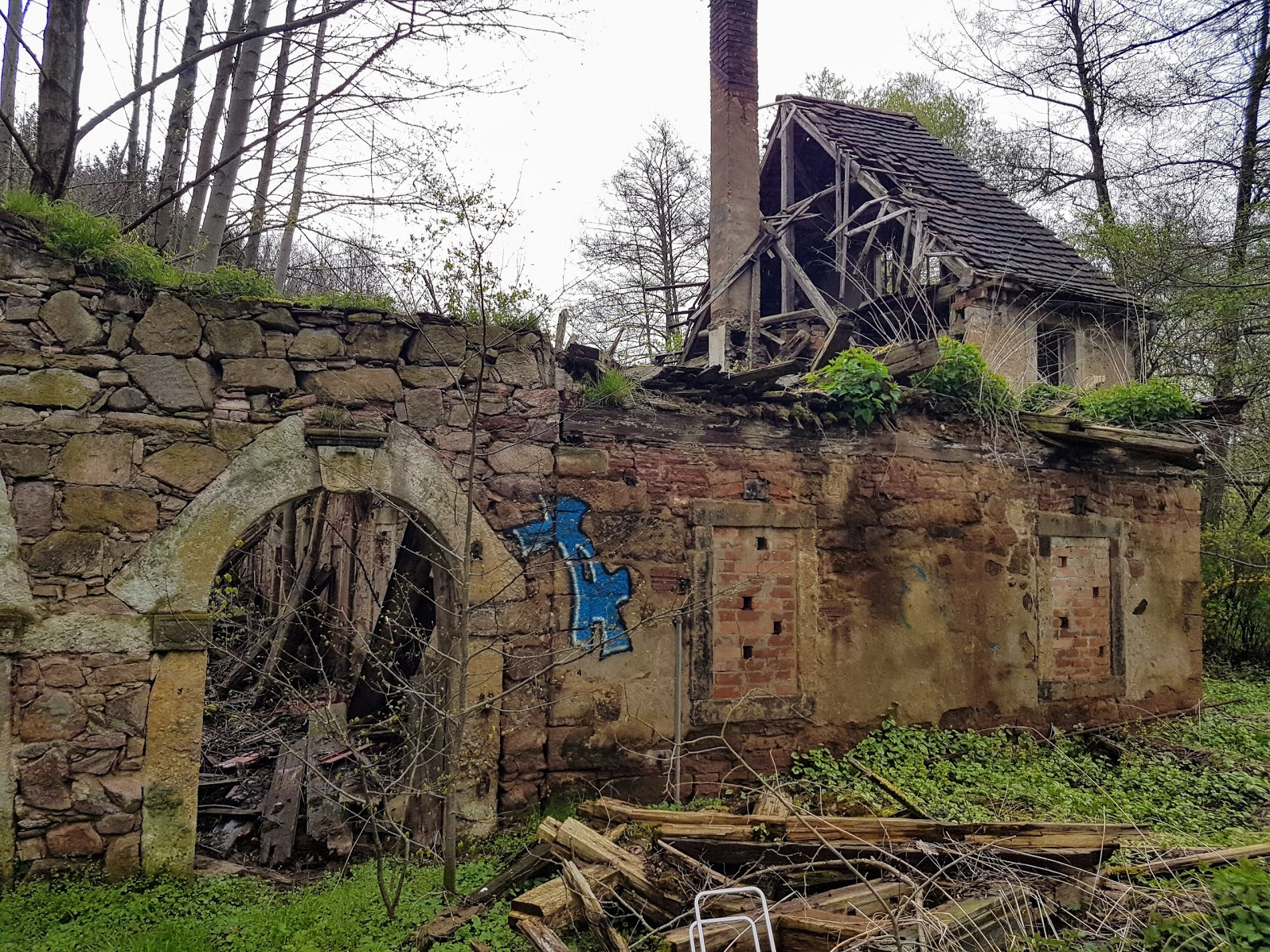 Hauswaldmühle in Kreischa (2017)